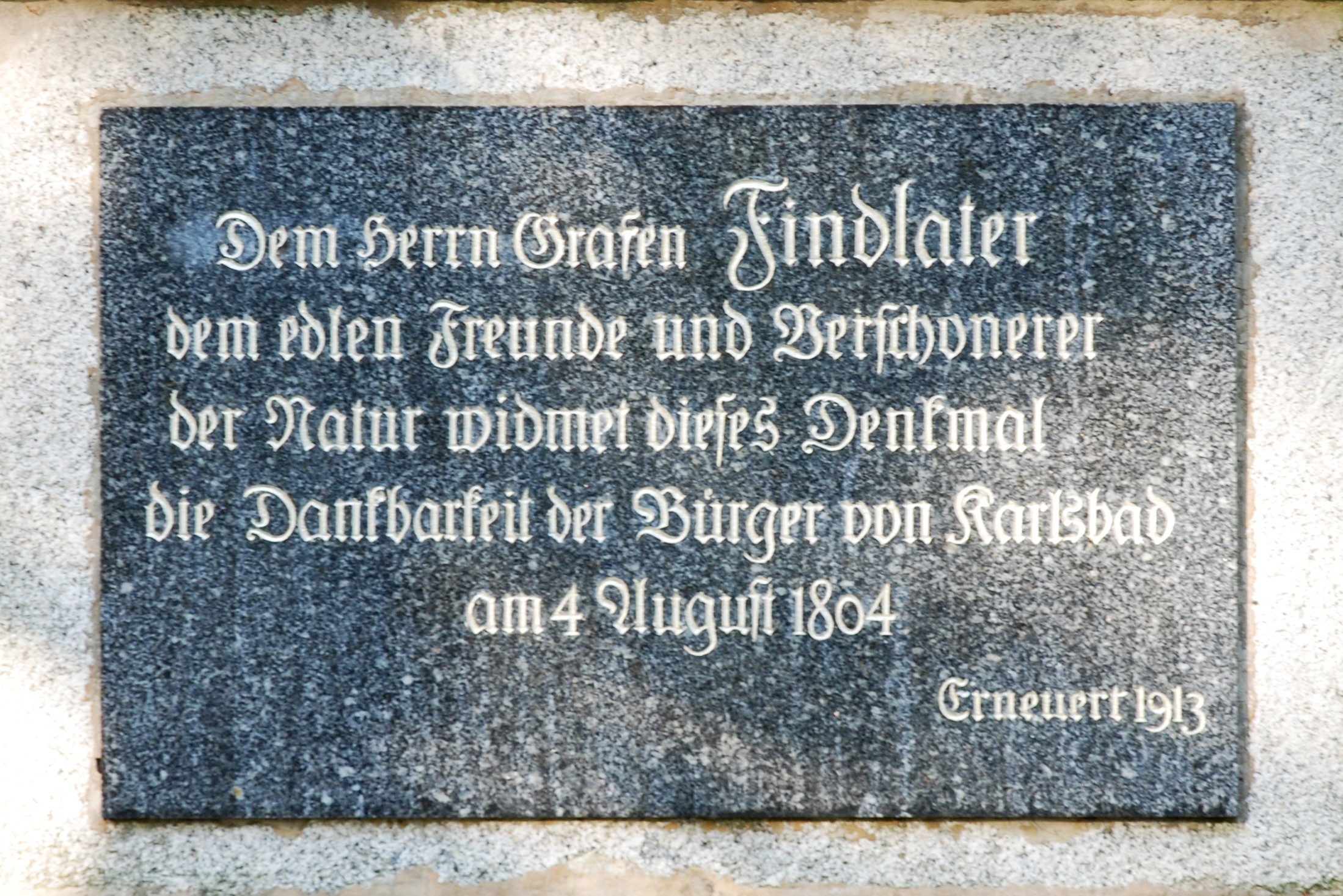 Pamětní deska na Findlaterově obelisku v karlovarských lázeňských lesích